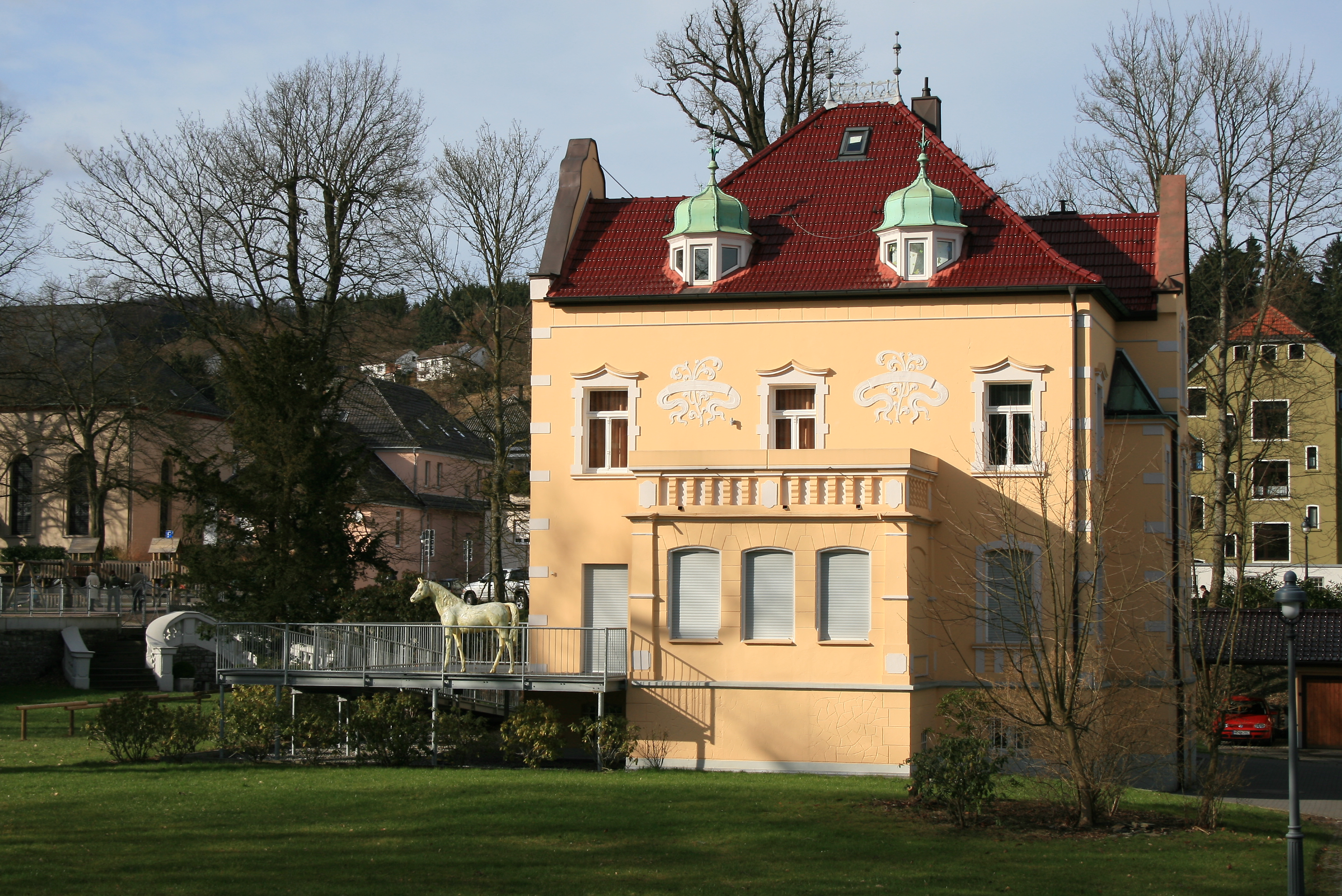 Villa Herfeld, Am Stadtpark in Neuenrade.